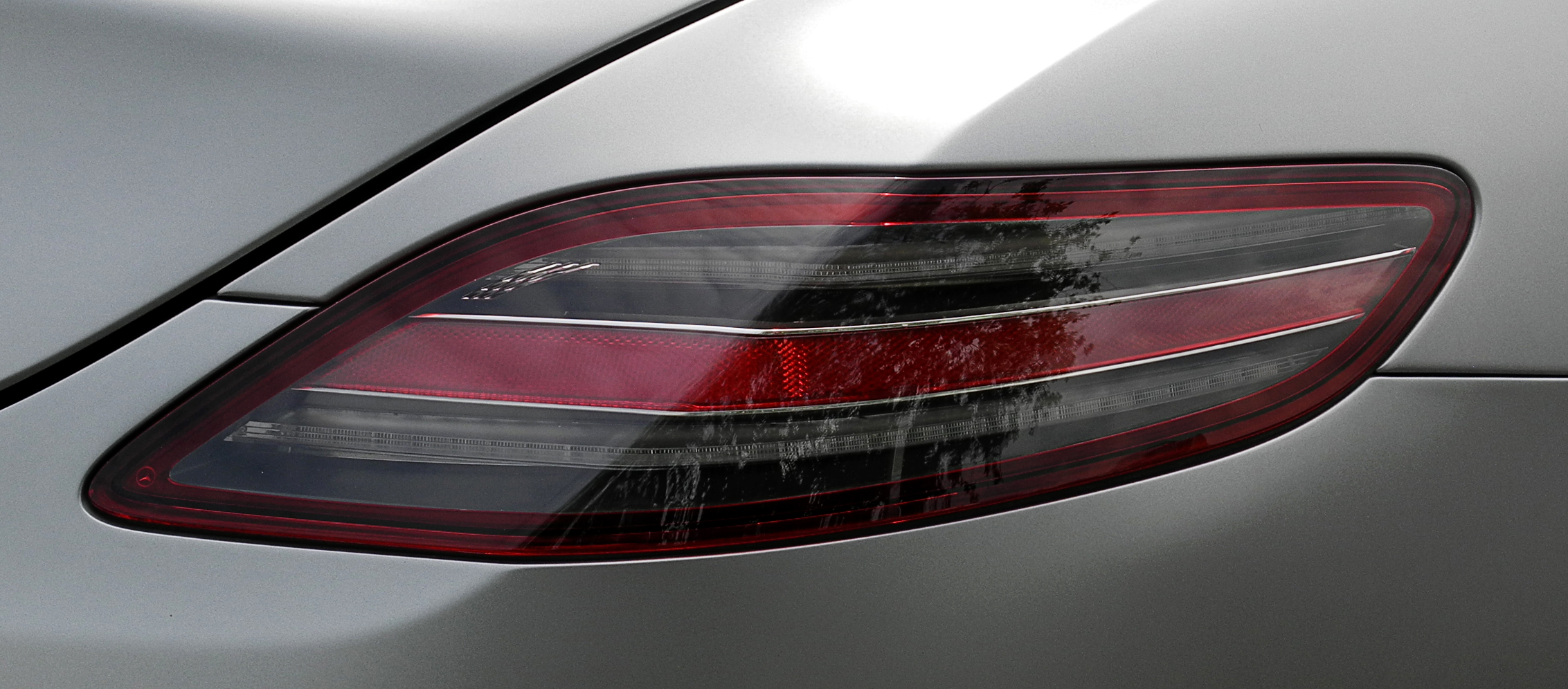 Mercedes-Benz SLS AMG (C 197)